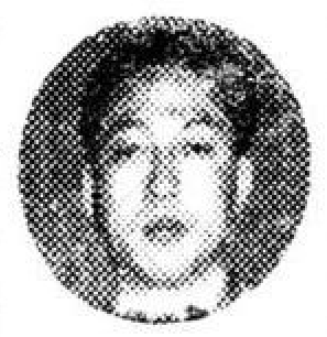 한국의 피부비뇨기과, 나병 의사 윤유선